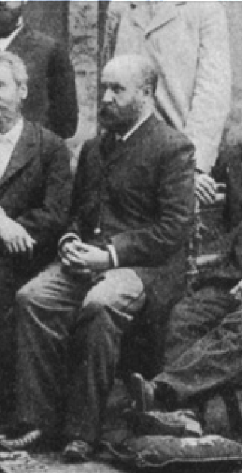 Русский историк, славист, археограф, публицист и общественно-политический деятель Андрей Владимирович Стороженко (1857-?) на праздновании 15-летнего юбилея журнала "Киевская старина"